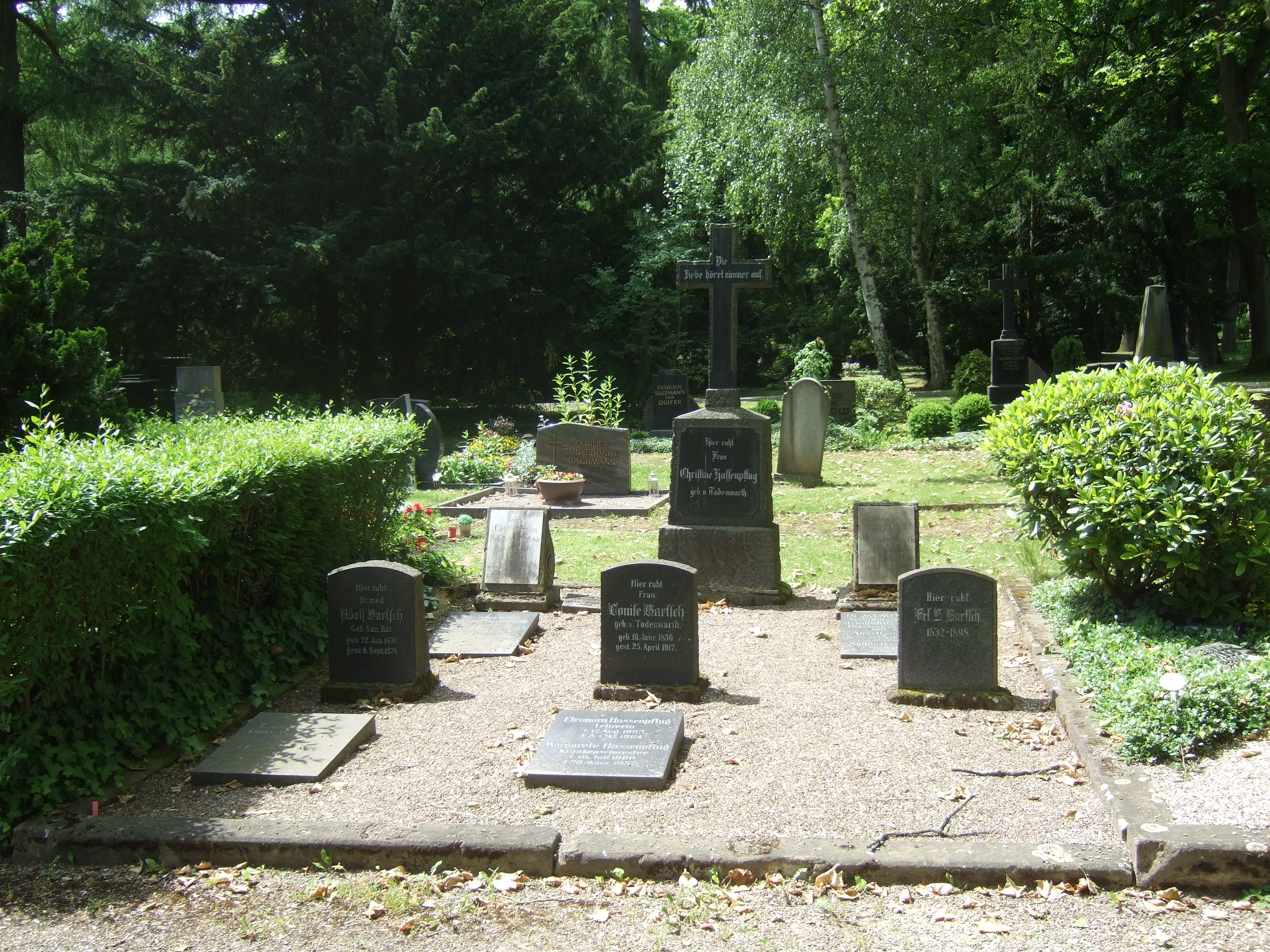 Grab von Karl Hassenpflug auf dem Hauptfriedhof Kassel.